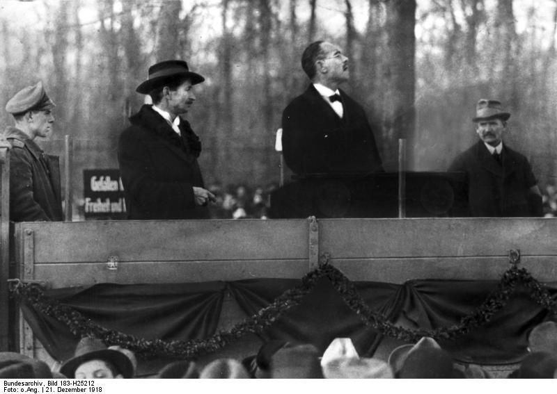 Berlin, Revolution, Beisetzung Zentralbild Die Beisetzung der Opfer des konterrevolutionären Putsches vom 6. Dezember 1918, der von dem sozialdemokratischen Stadtkommandaten Berlins, Otto Wels, dem Generalkommando des Gardekorps sowie Vertretern des Kriegsministeriums und des Auswärtigen Amtes vorbereitet worden war. U.B.z.: die Massendemonstration des Berliner Proletariats anläßlich der Beisetzung am 21.12.1918. Karl Liebknecht bei seiner Rede rechts hinter ihm der Sozialdemokrat Otto Wels Abgebildete Personen: Liebknecht, Karl: Sozialist, Führer des Spartakusbundes, ermordet 1919, Deutschland (PND 11857275X) Wels, Otto: Vorstandsmitglied der SPD, Reichstagsabgeordneter (MdR), Deutschland